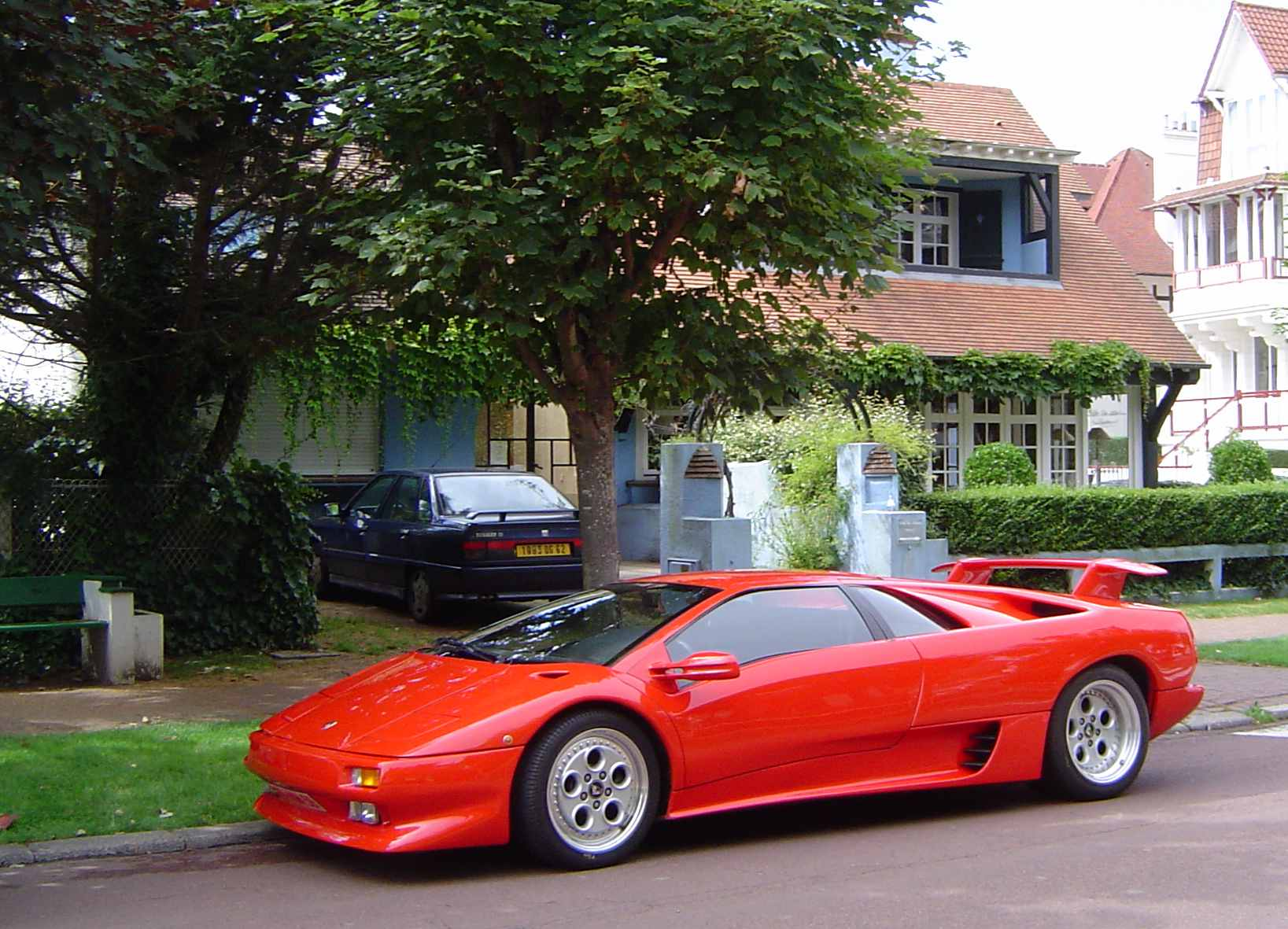 Photo prise par moi-même au Touquet le 30 juillet 2006